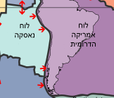 לדניאל נגזר ונחתך מהתמונה Plates tect2 en.svg שבוויקישיתוף.